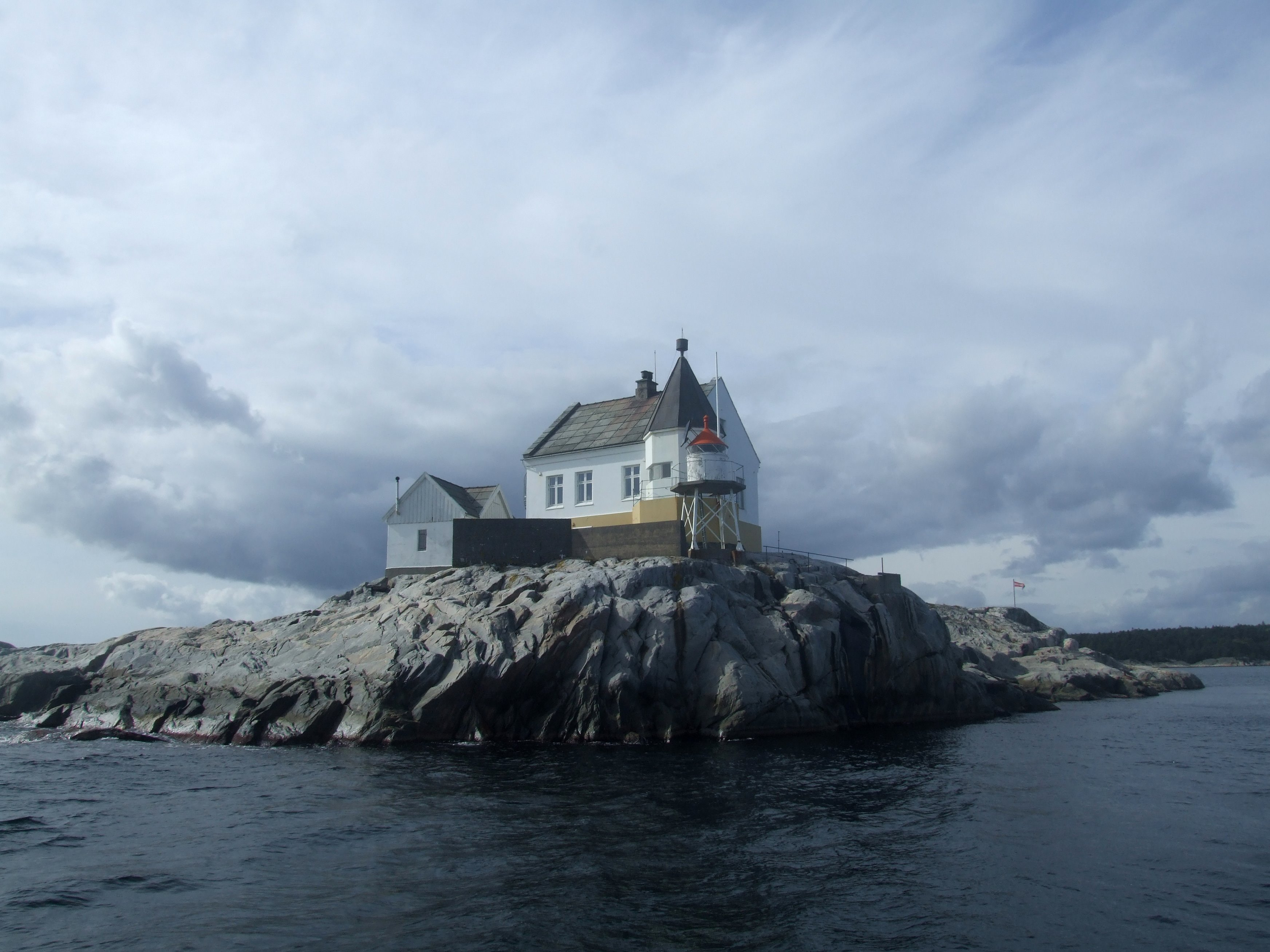 Saltholmen fyr